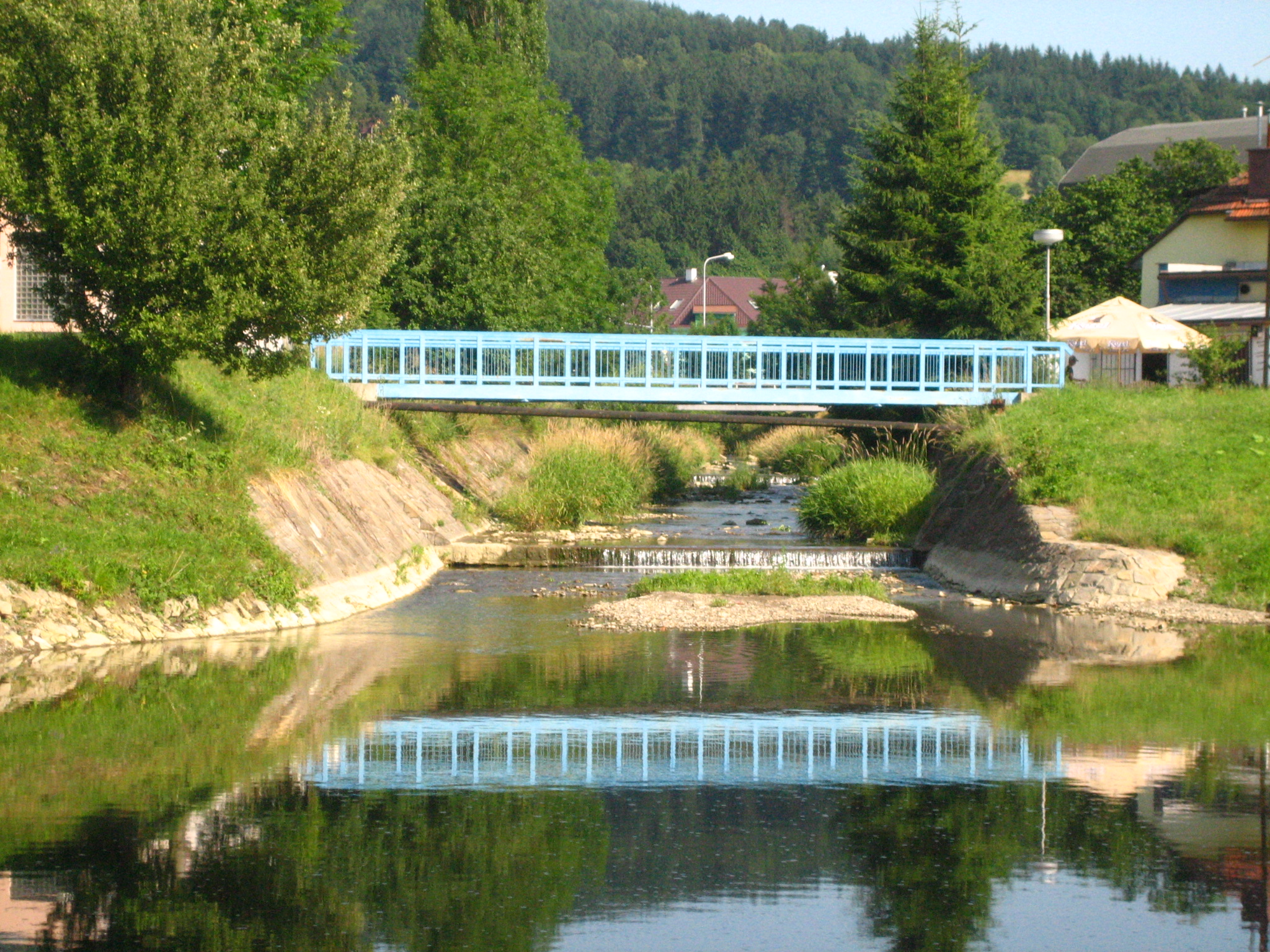 Ústí potoka Jasenice do Vsetínské Bečvy na Vsetíně